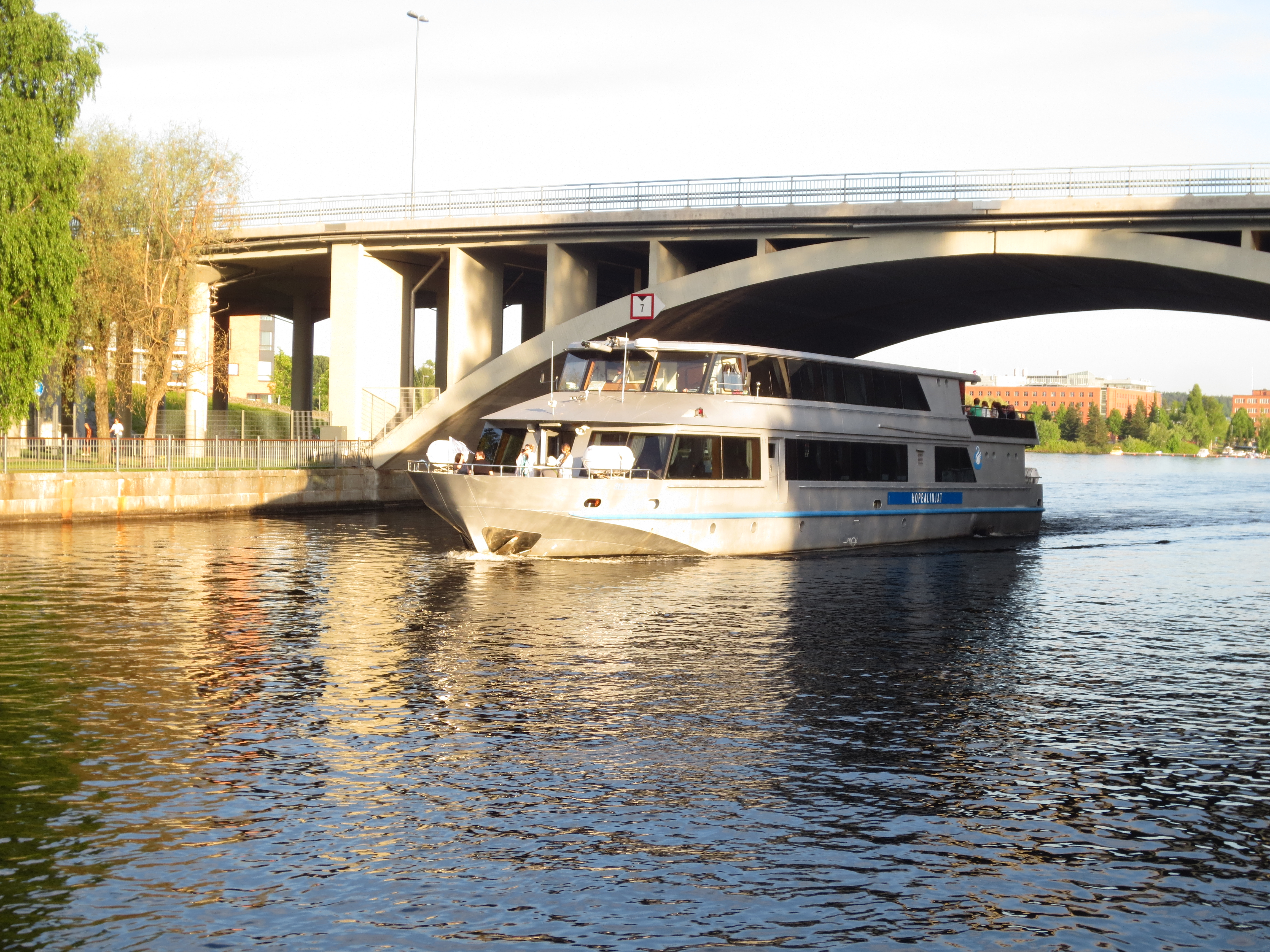 MS Silver Sky alittamassa Ratinansiltaa Tampereella